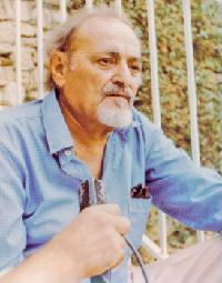 الشاعر يوسف الخال